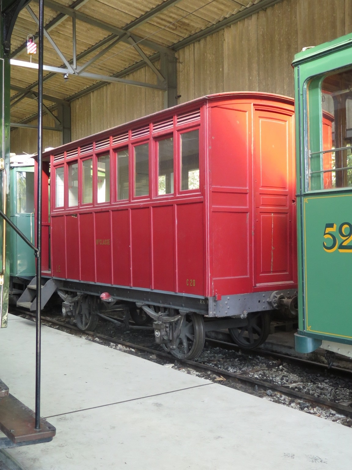 Ansicht des Personenwagens C2 20 aus dem Jahre 1865 der Lausanne–Echallens–Bercher-Bahn (LEB). Ursprünglich aus der Serie B2 1–5 der Lausanne–Echallens-Bahn (LE), die den Nummern B2 2, B2 3 sowie C2 2, C2 3 und C2 6 der Mont Cenis-Bahn (MC) entstammen.